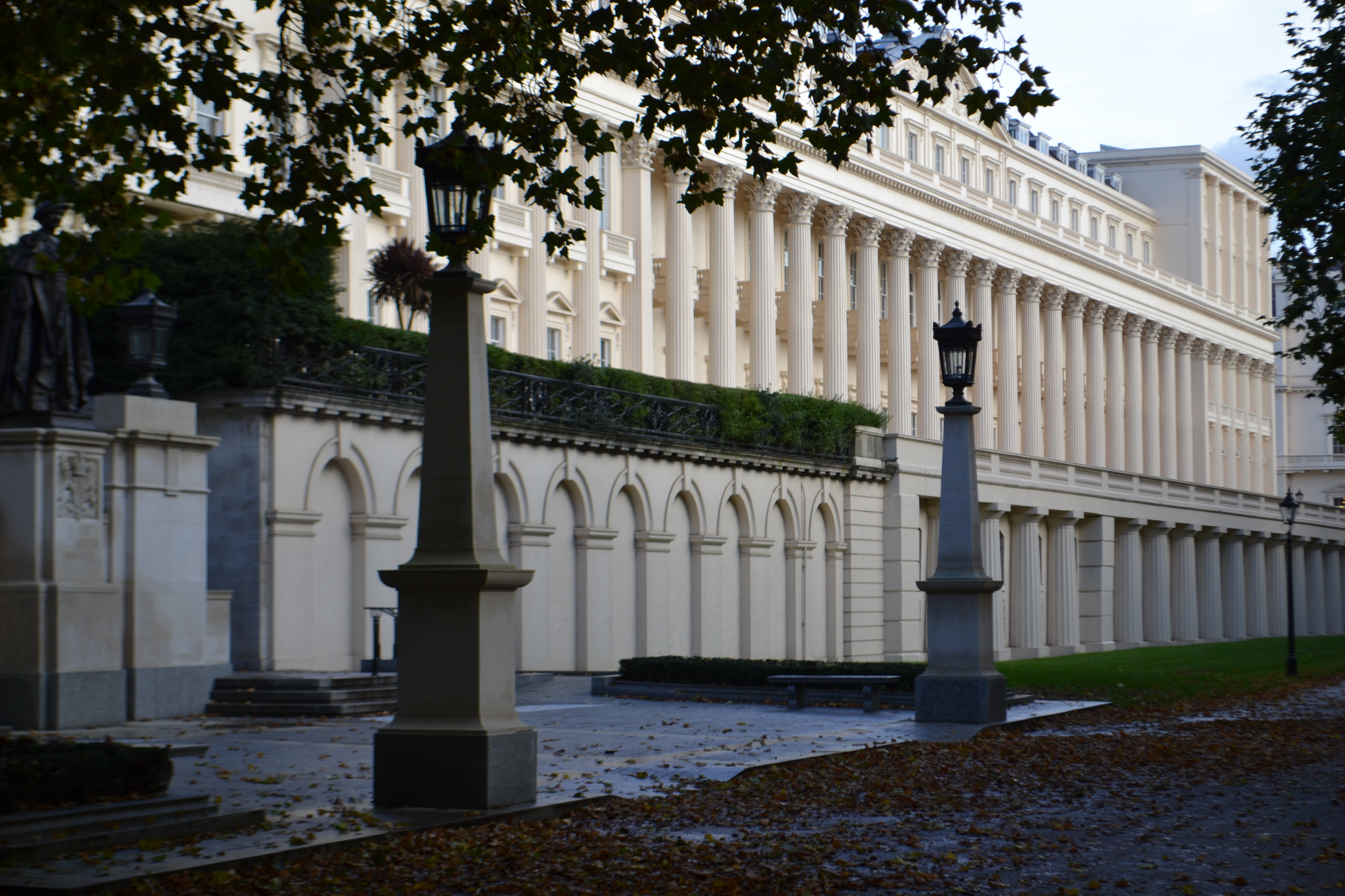 Carlton House Terrace, Londres.